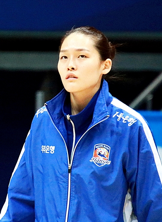 160101 여자농구 신한은행 vs 우리은행 직찍 1